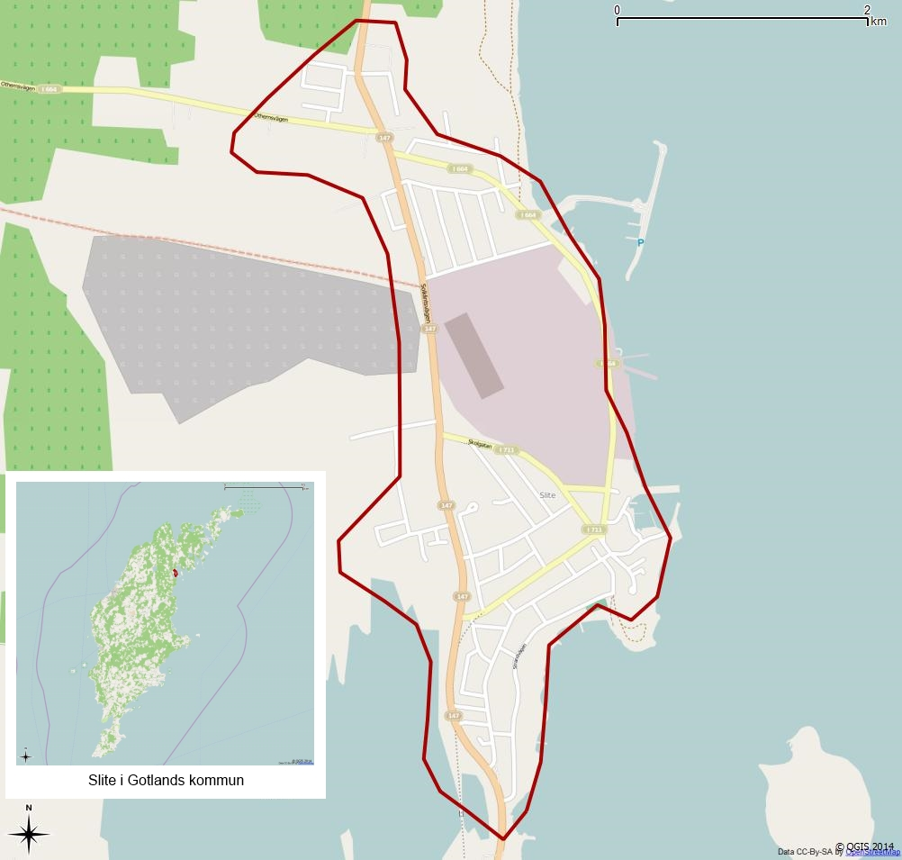 Tätorten Slites gränser 1990 enligt Atlas över rikets indelningar 1992.